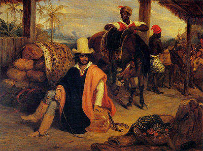 Tropeiro Paulista num pouso de tropeiros